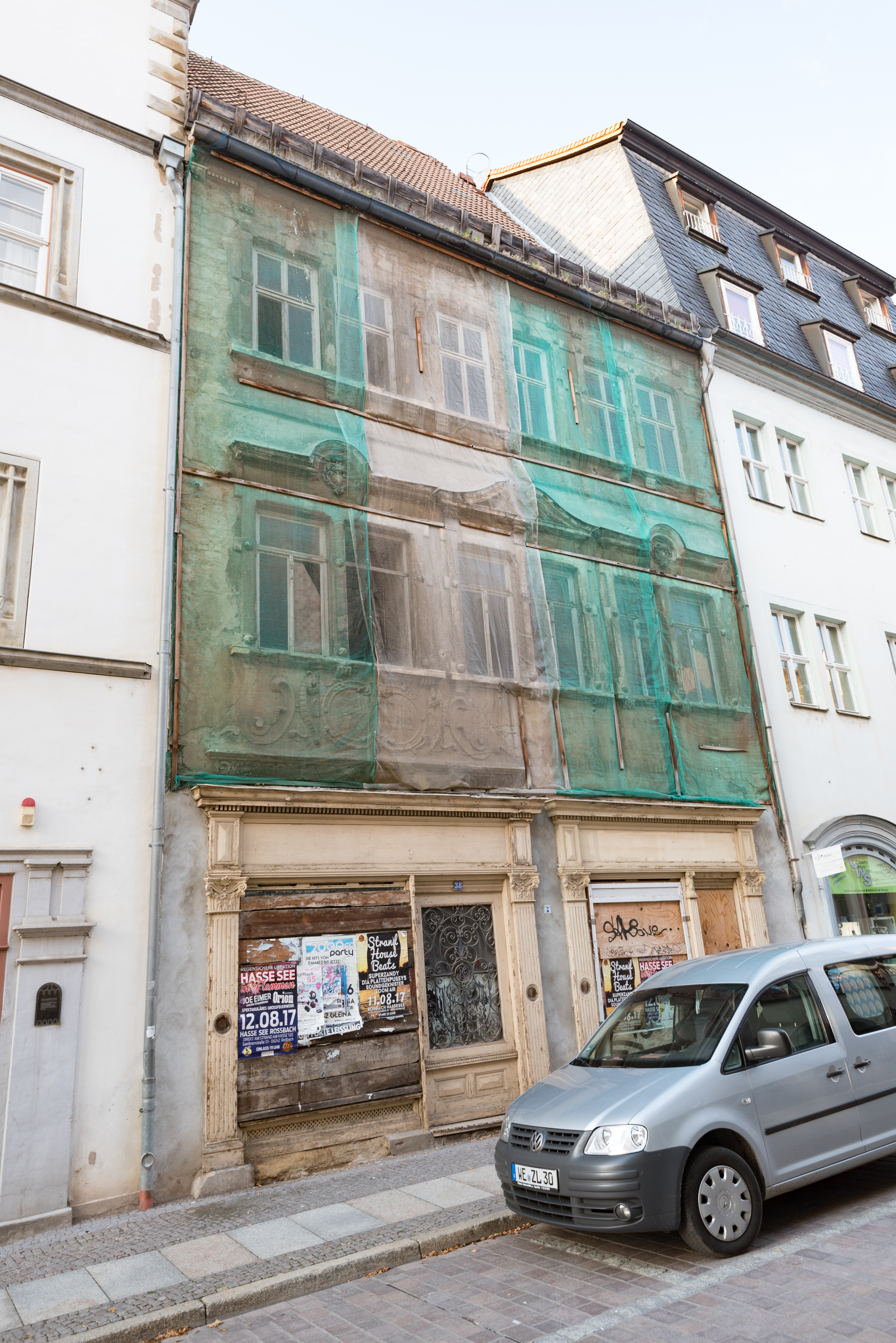 Naumburg (Saale), Marienstraße 38